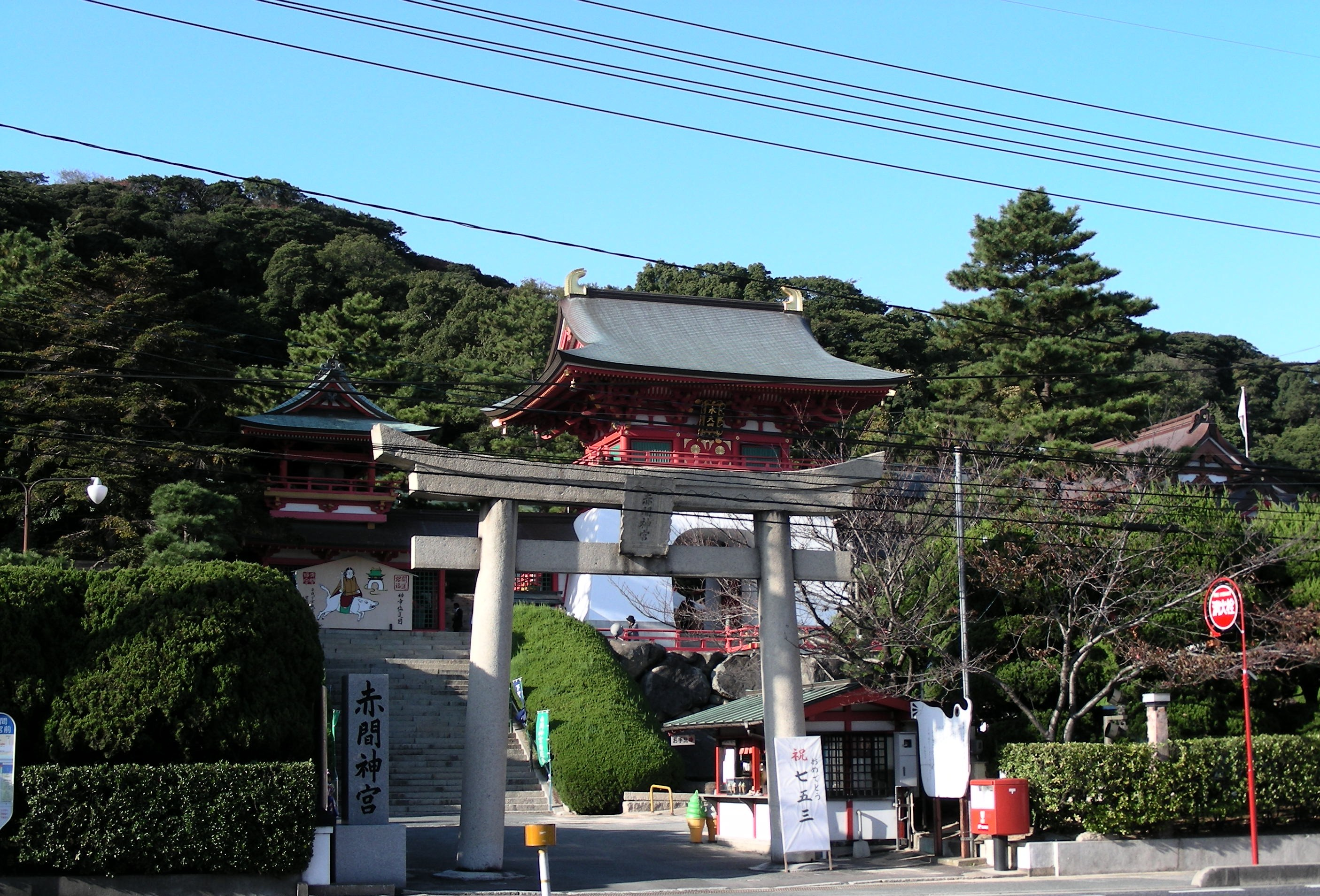 山口県下関市の赤間神宮。2007年11月投稿者撮影。